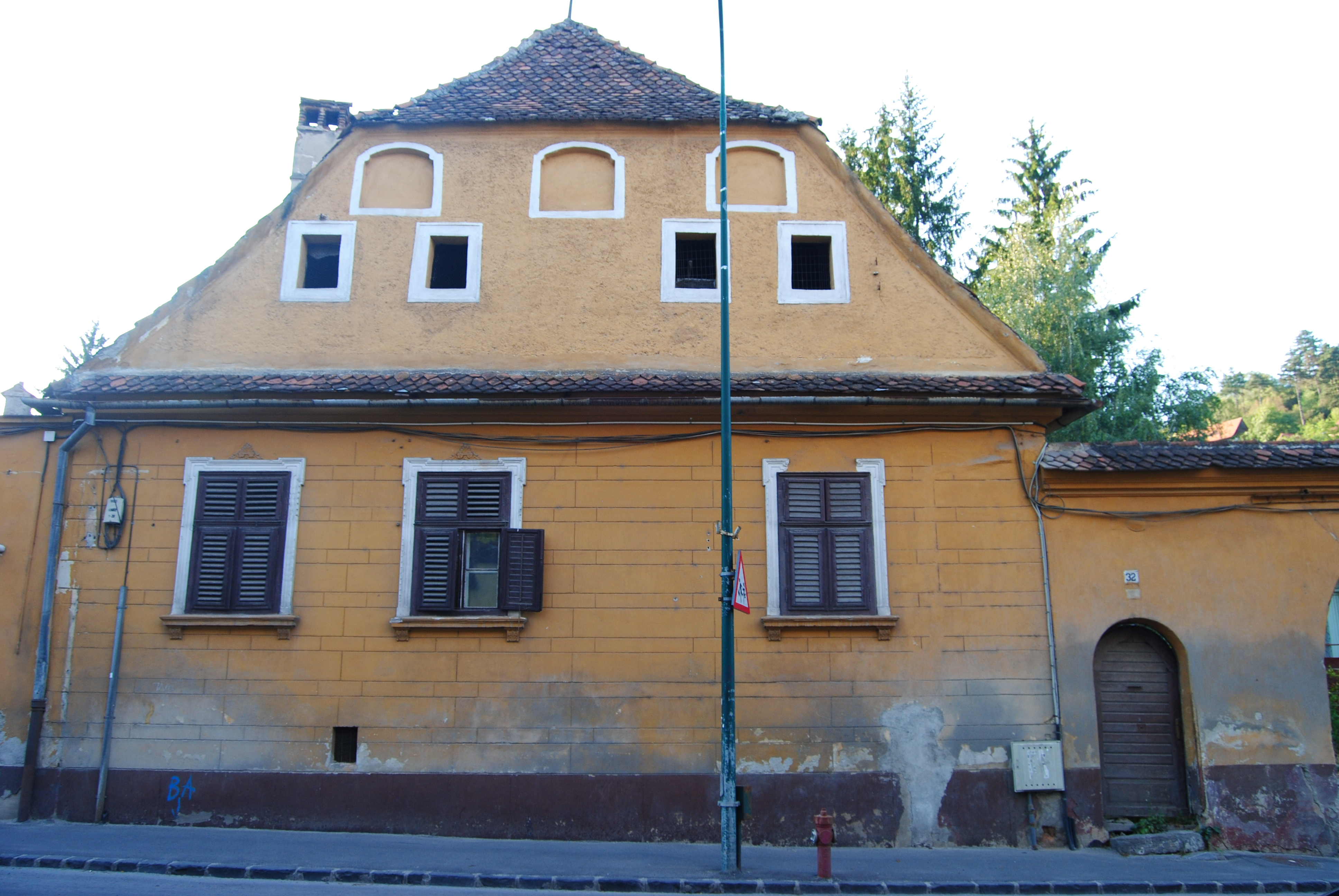 Casa Brâncoveanu-Manolache Lambrino; Str. Brâncoveanu Constantin 32, Brașov